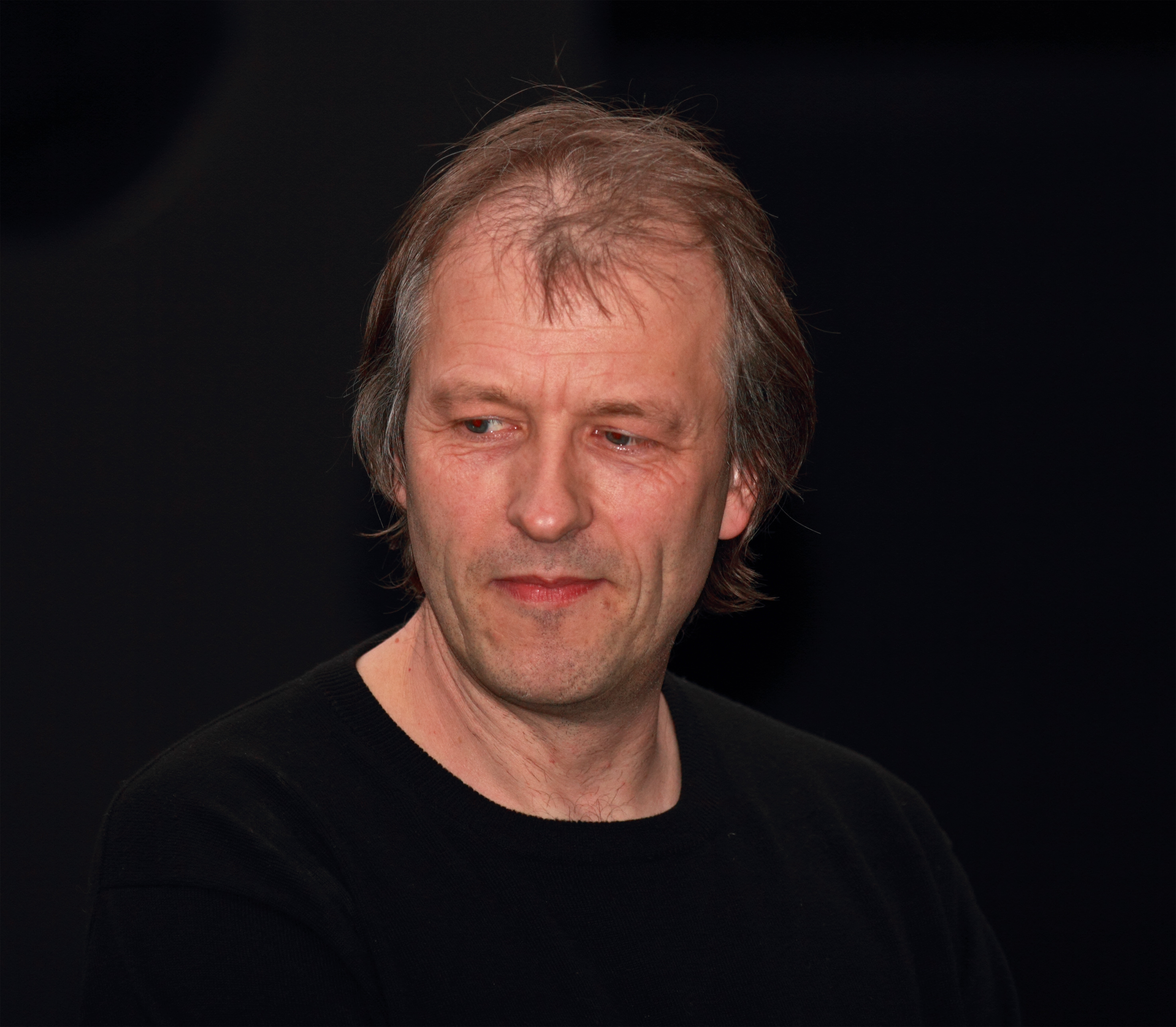 Verleihung des Schallwelle-Musikpreises am 10. März 2012. Kuppel des Planetariums Bochum. Erik Wøllo vor seinem Auftritt.